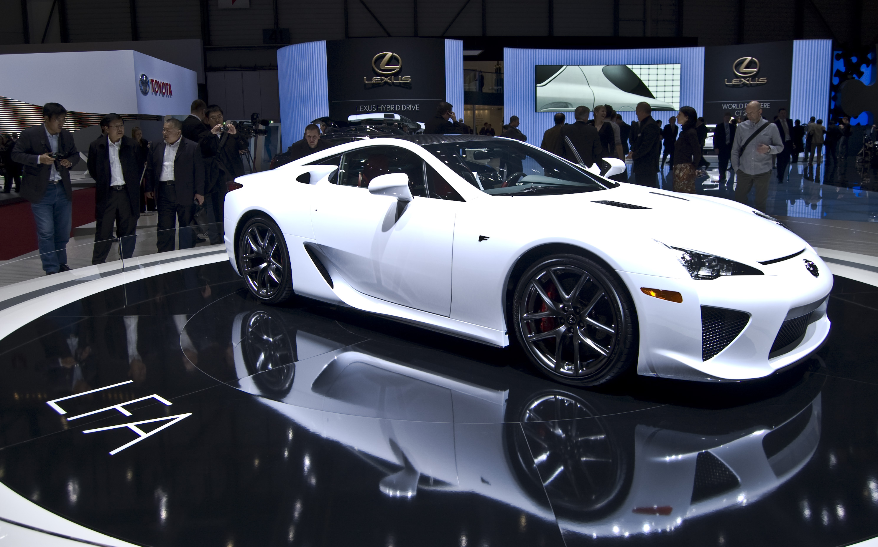 Lexus LFA en el Sal�n de Ginebra 2010.